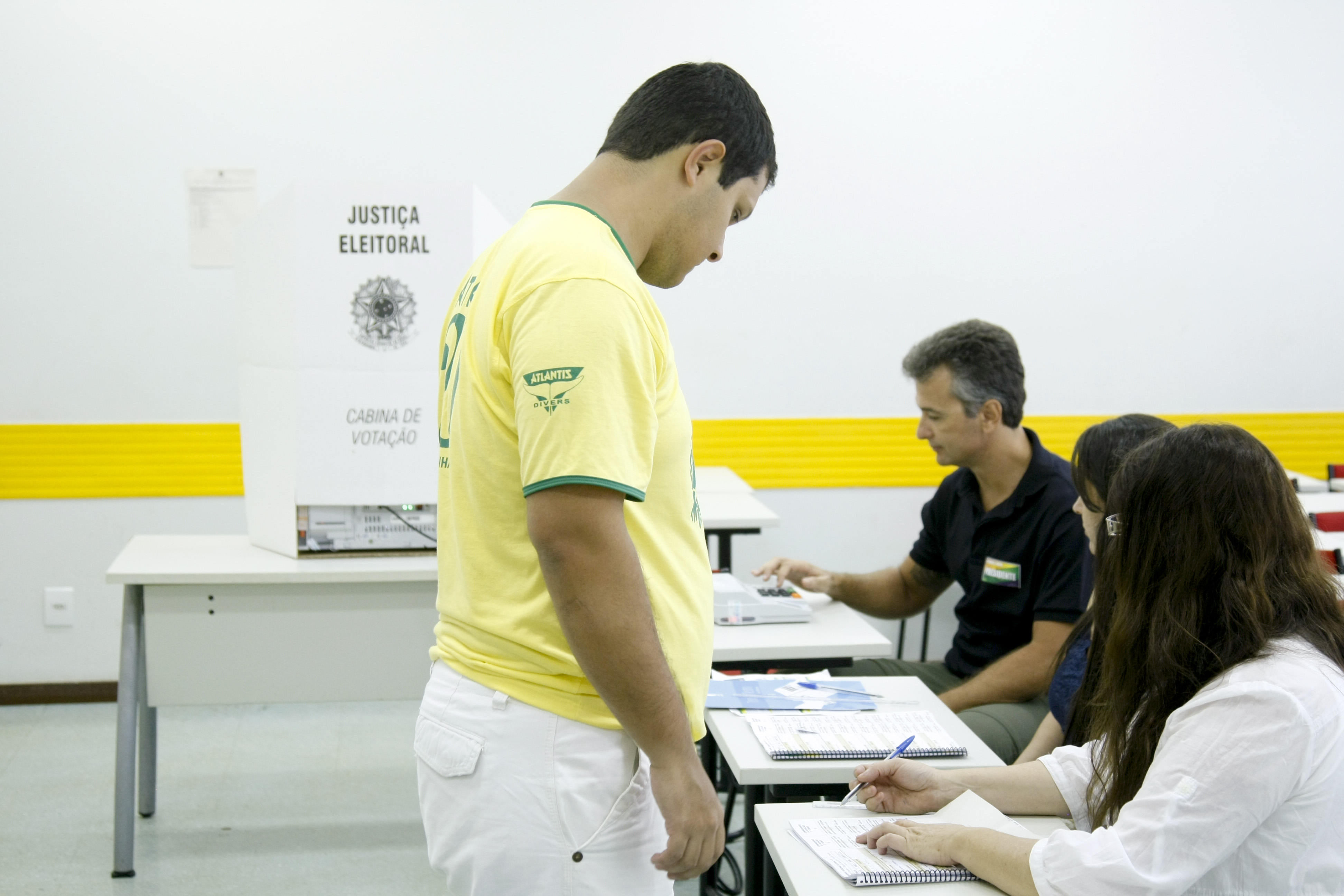 Eleições 2014 - Voto em trânsito no IESB, Asa Sul, Brasília. Foto: Marri Nogueira/Agência Senado